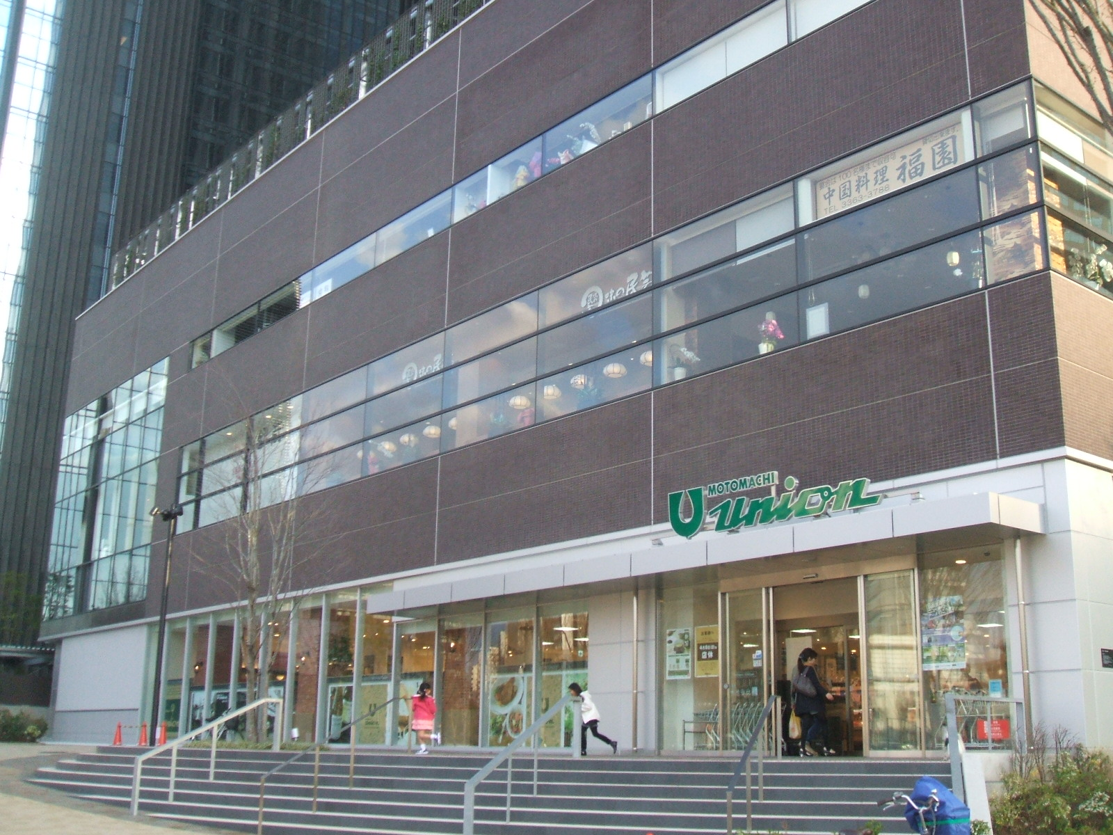 東京都新宿区北新宿2丁目の新宿フロントタワー店舗棟。